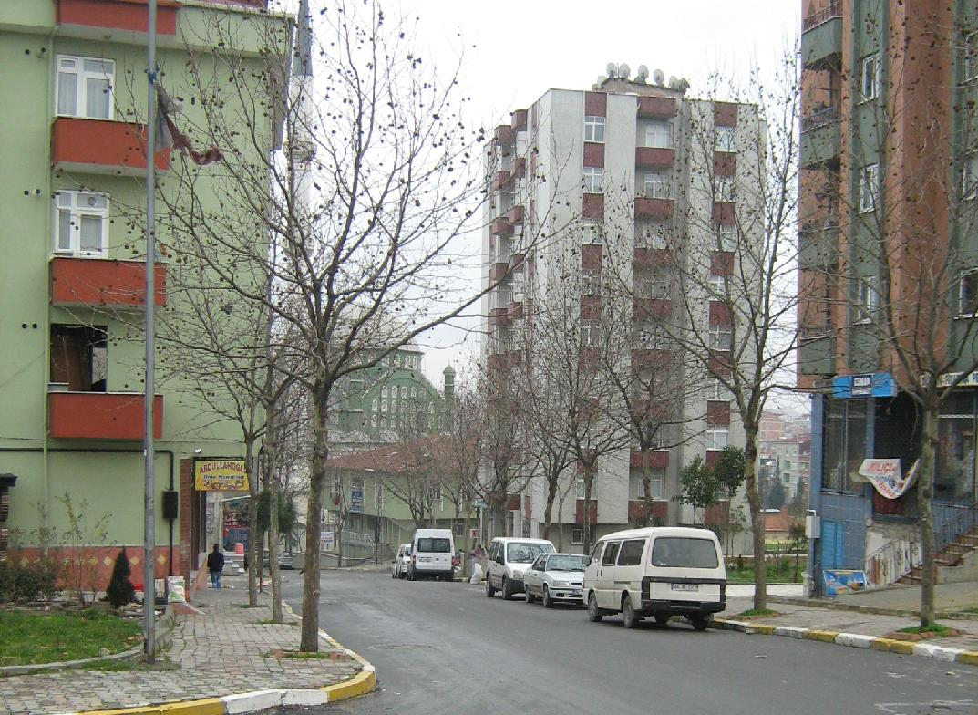 Foroğraf tarafımdan çekildi.